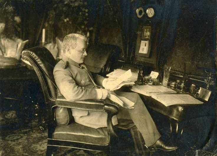 Приамурский генерал-губернатор Николай Львович Гондатти